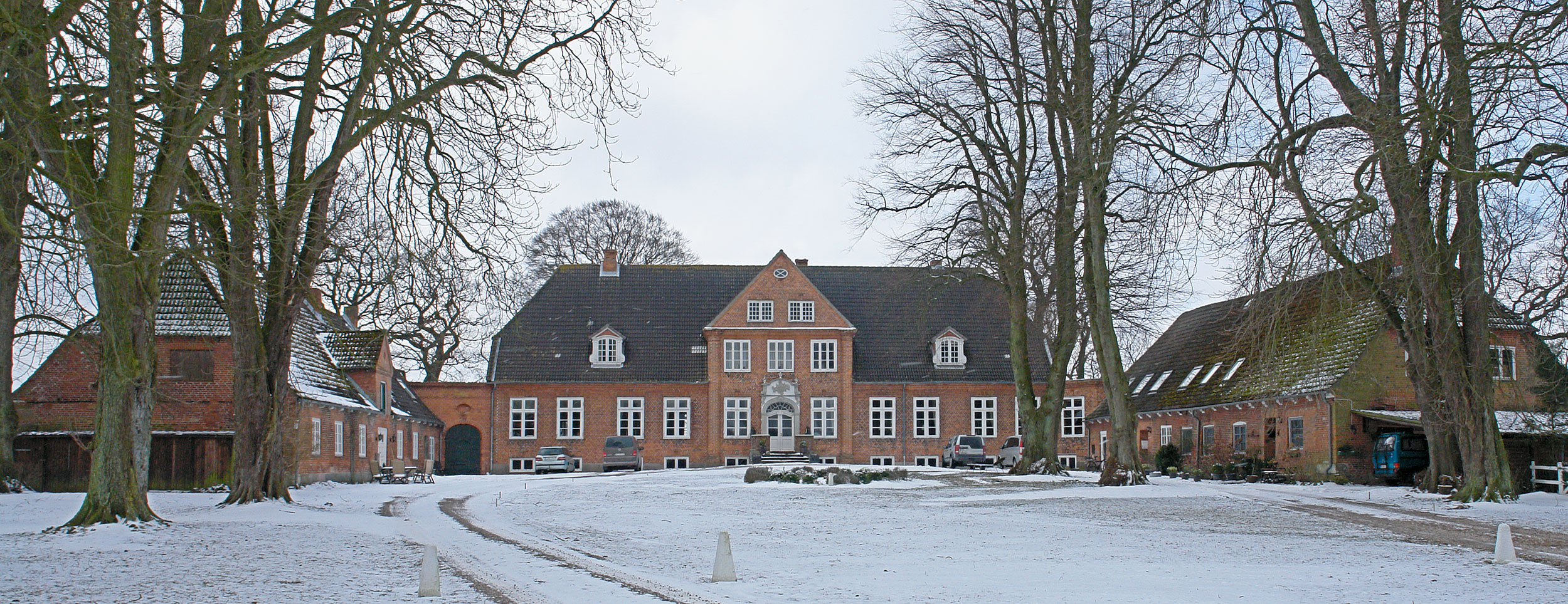 Gut Eckhof, Dänischenhagener Straße, Herrenhaus und Wirtschaftsgebäude